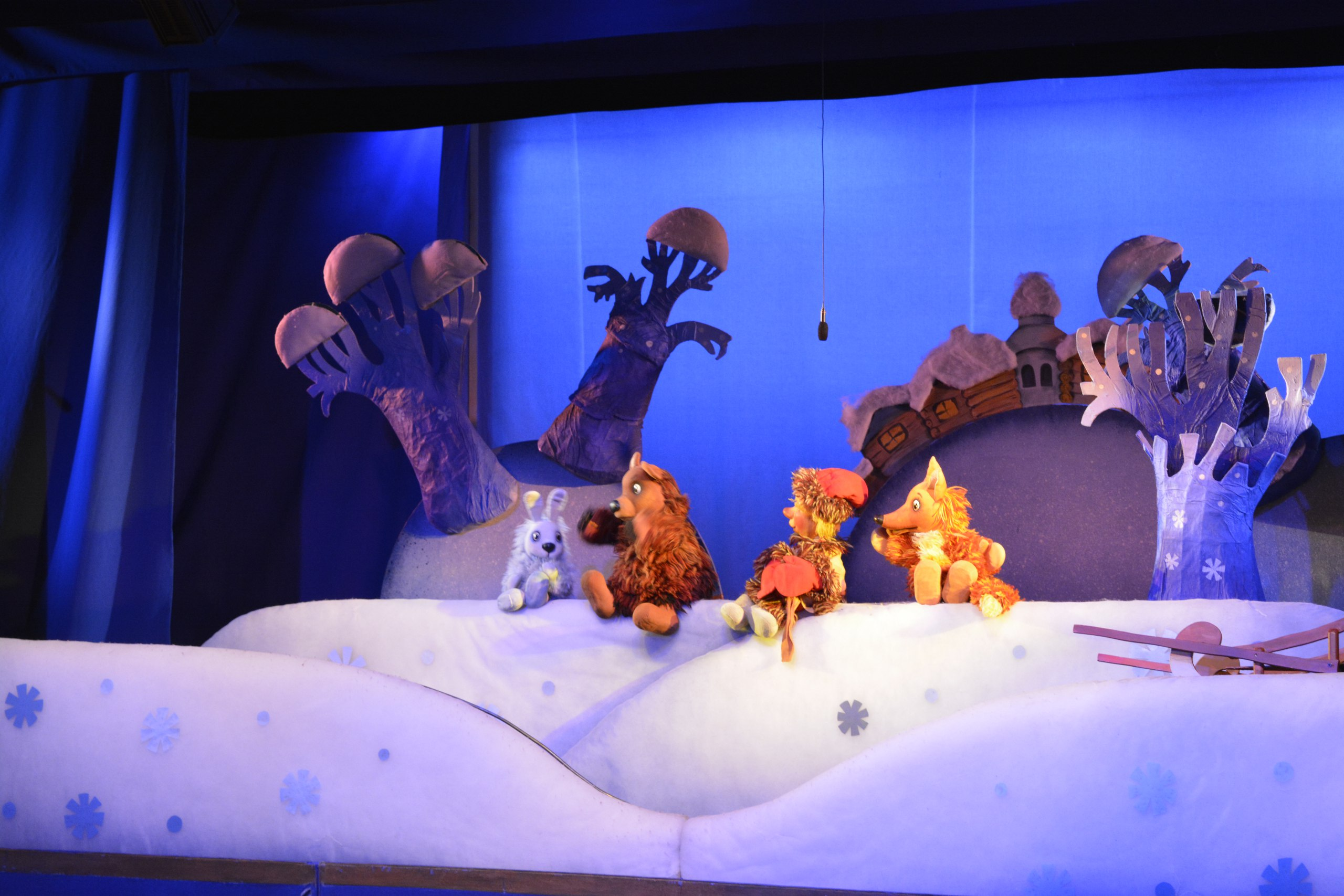 Сцена из спектакля По щучьему велению